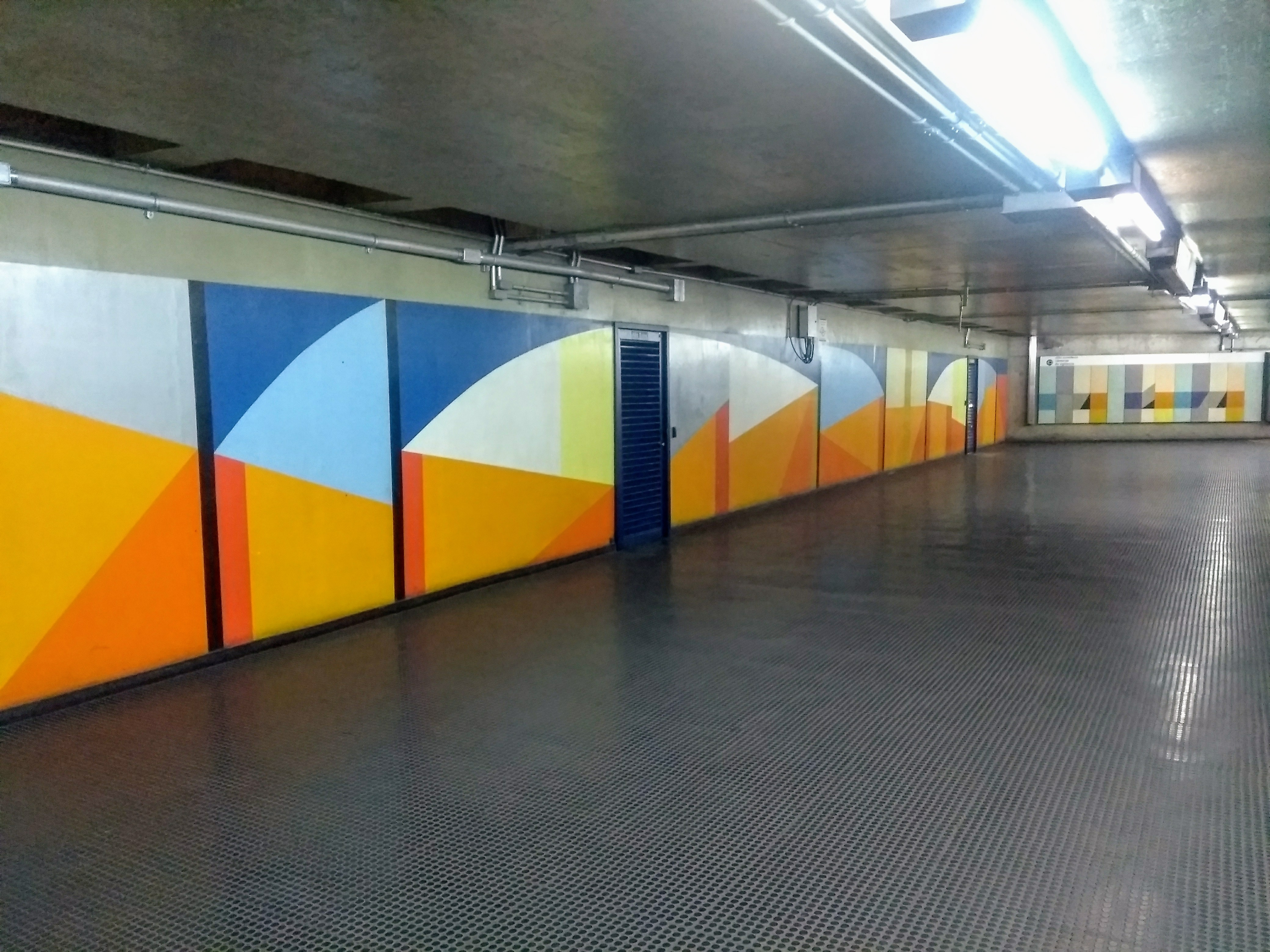 Segmento da obra Sem título, de Odiléa Toscano, localizada no Metrô Santana, em São Paulo.